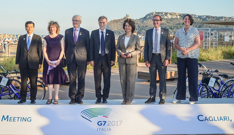 Foto dei partecipanti al G7 Trasporti di Cagliari del 2017